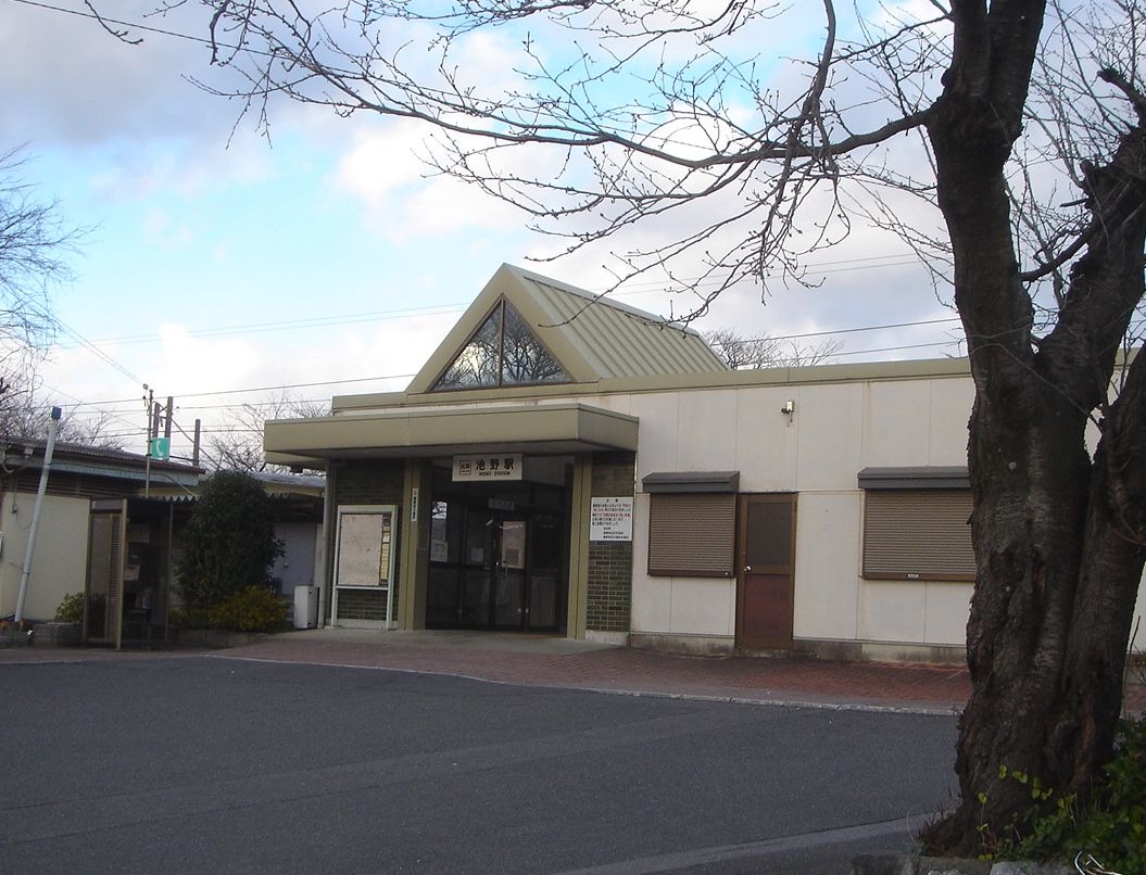 池野駅